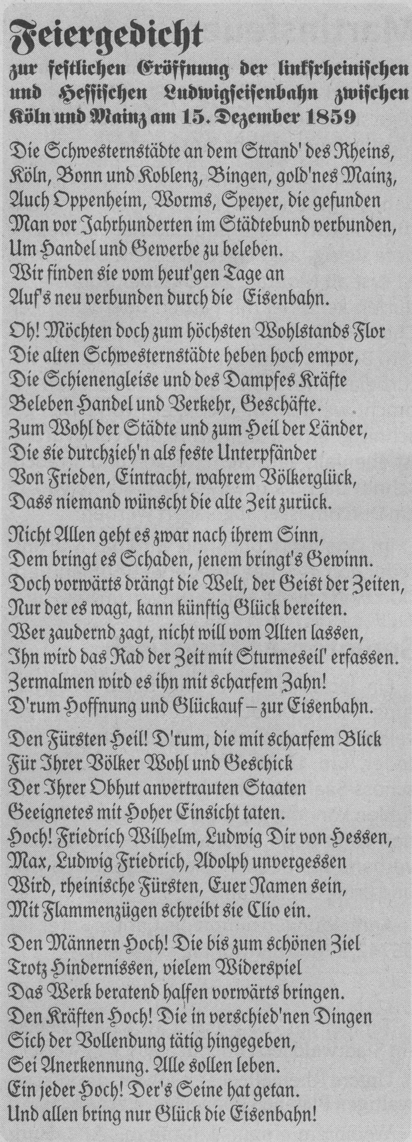 Feiergedicht zur feierlichen Eröffnung der linksrheinischen und hessischen Ludwigseisenbahn zwischen Köln und Mainz am 15. Dezember 1859